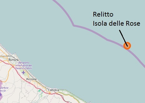 Posizione geografica del relitto dell'Isola delle Rose